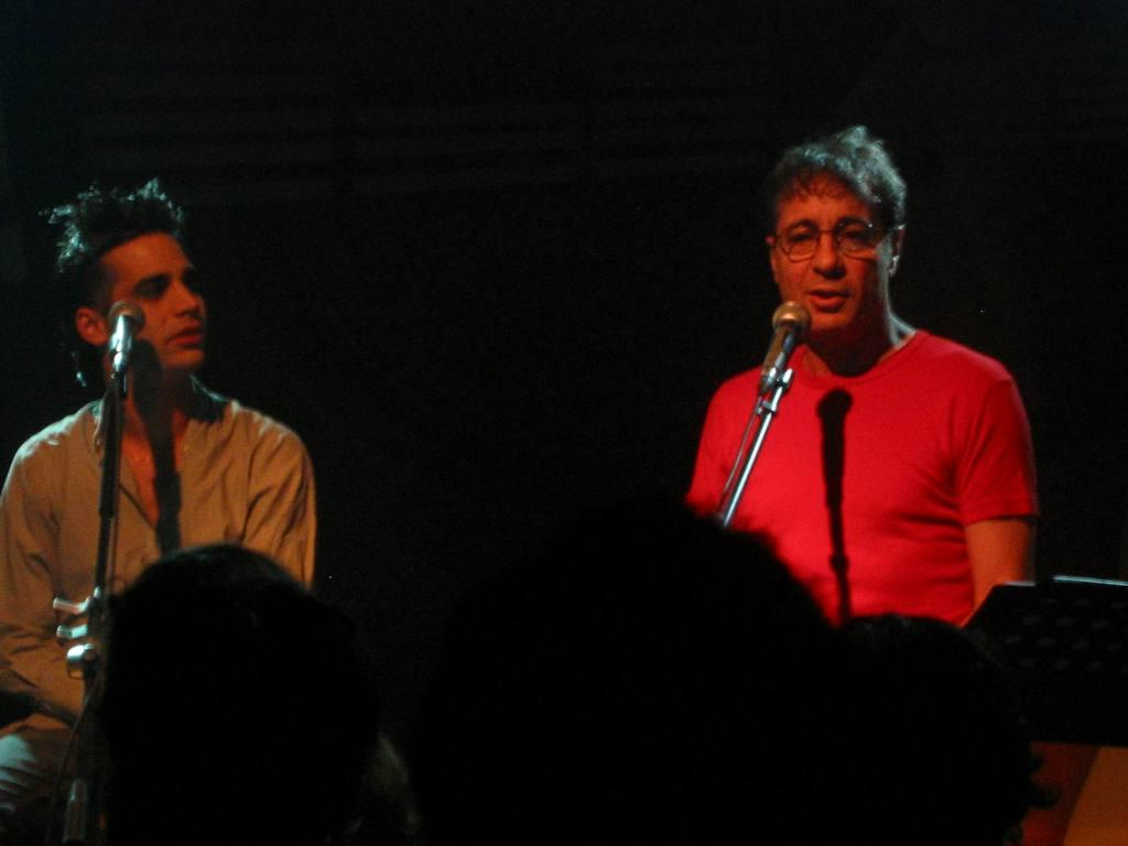 יהונתן גפן מופיע עם בנו המעריץ אביב גפן מופיע עם אביו המעריץ